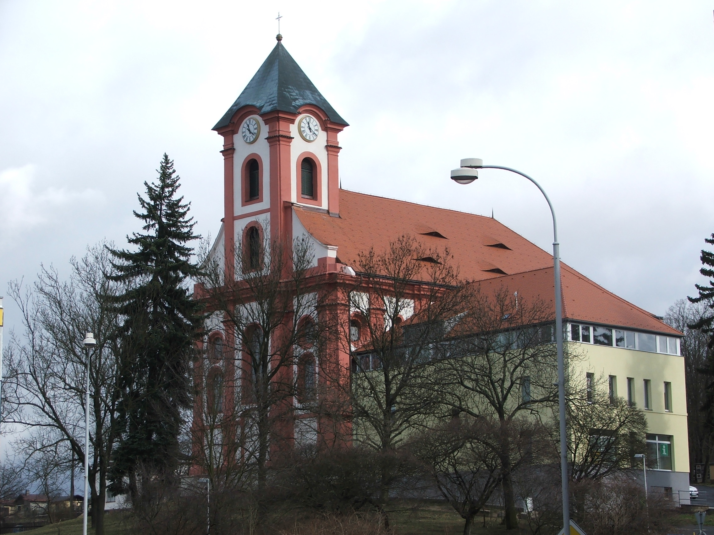 Kostel sv.Vavřince v Chodově u Karlových Var